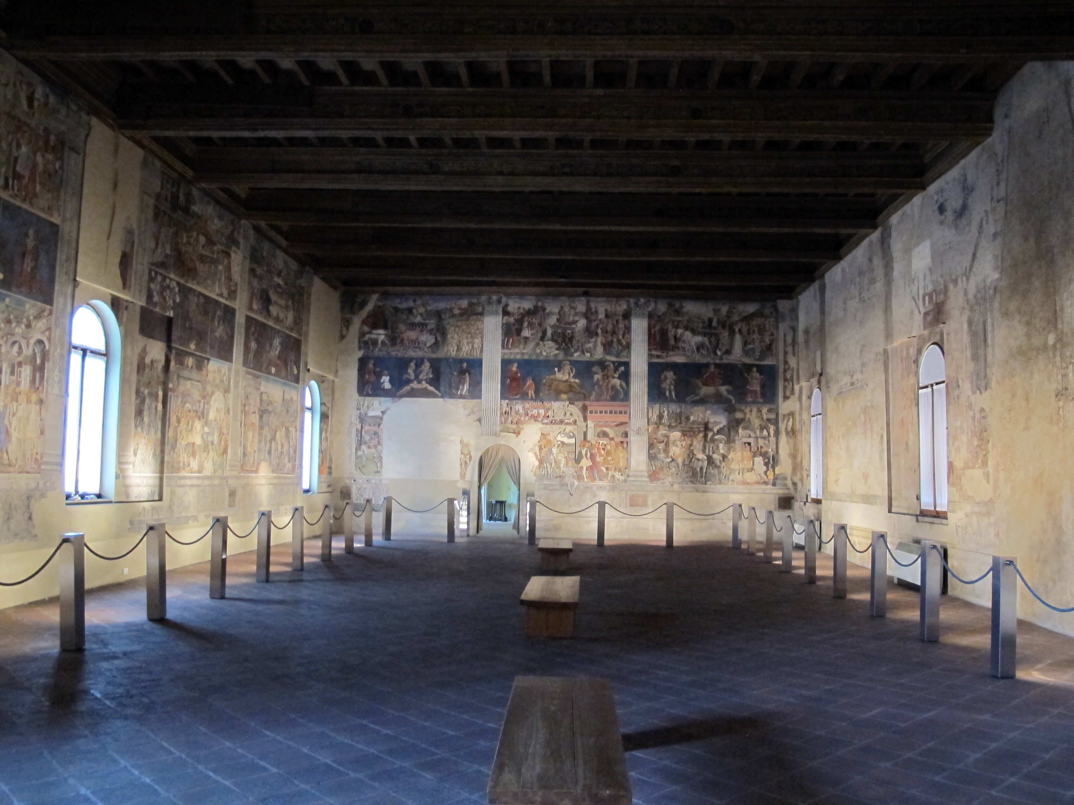 Palazzo Schifanoia This is a photo of a monument which is part of cultural heritage of Italy.